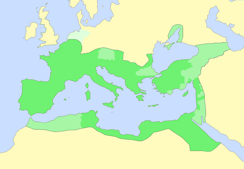 Das Römische Weltreich unter Kaiser Augustus (Dunkelgrün: römische Provinzen, Hellgrün: abhängige Gebiete/Klientelstaaten, Blassgrün: Provinz Germania)